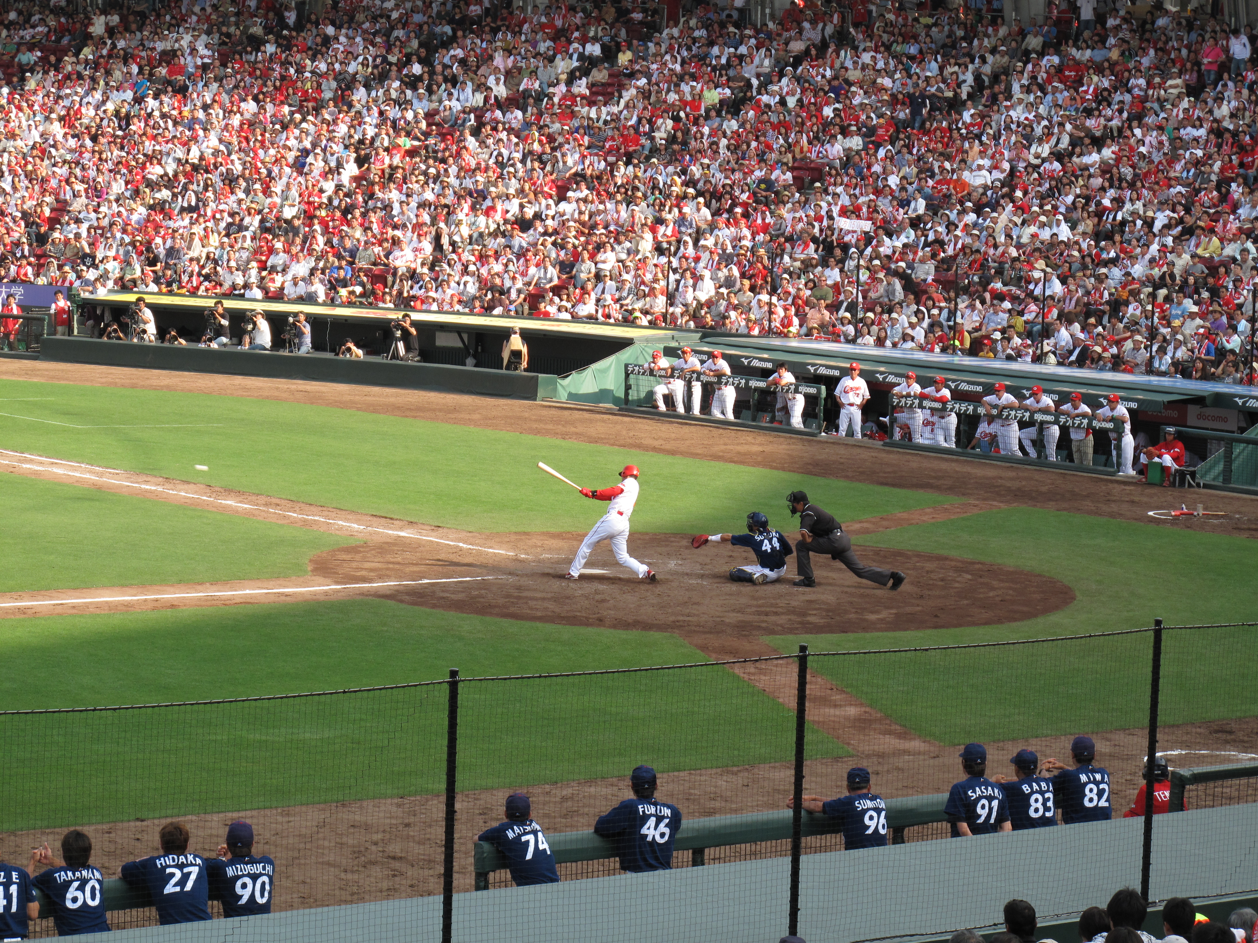 2009年プロ野球（NPB）日本生命交流戦、カープ対バッファローズ戦、５回の裏を撮影